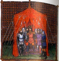 Mérovée sous sa tente - (miniature des « Grandes chroniques de France », XIVe siècle)